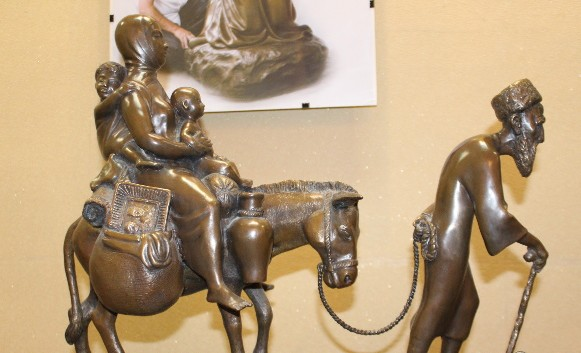 "Беженцы". Автор Катиб Мамедов